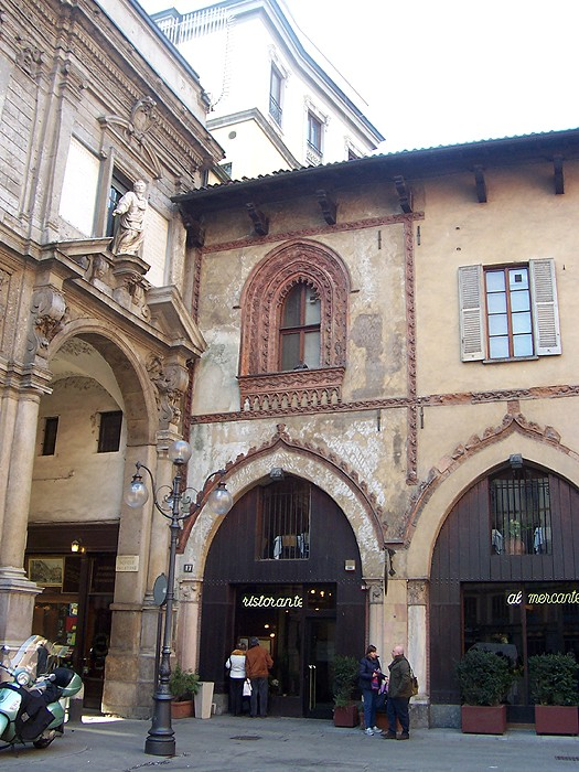 Milano - Casa Panigarola